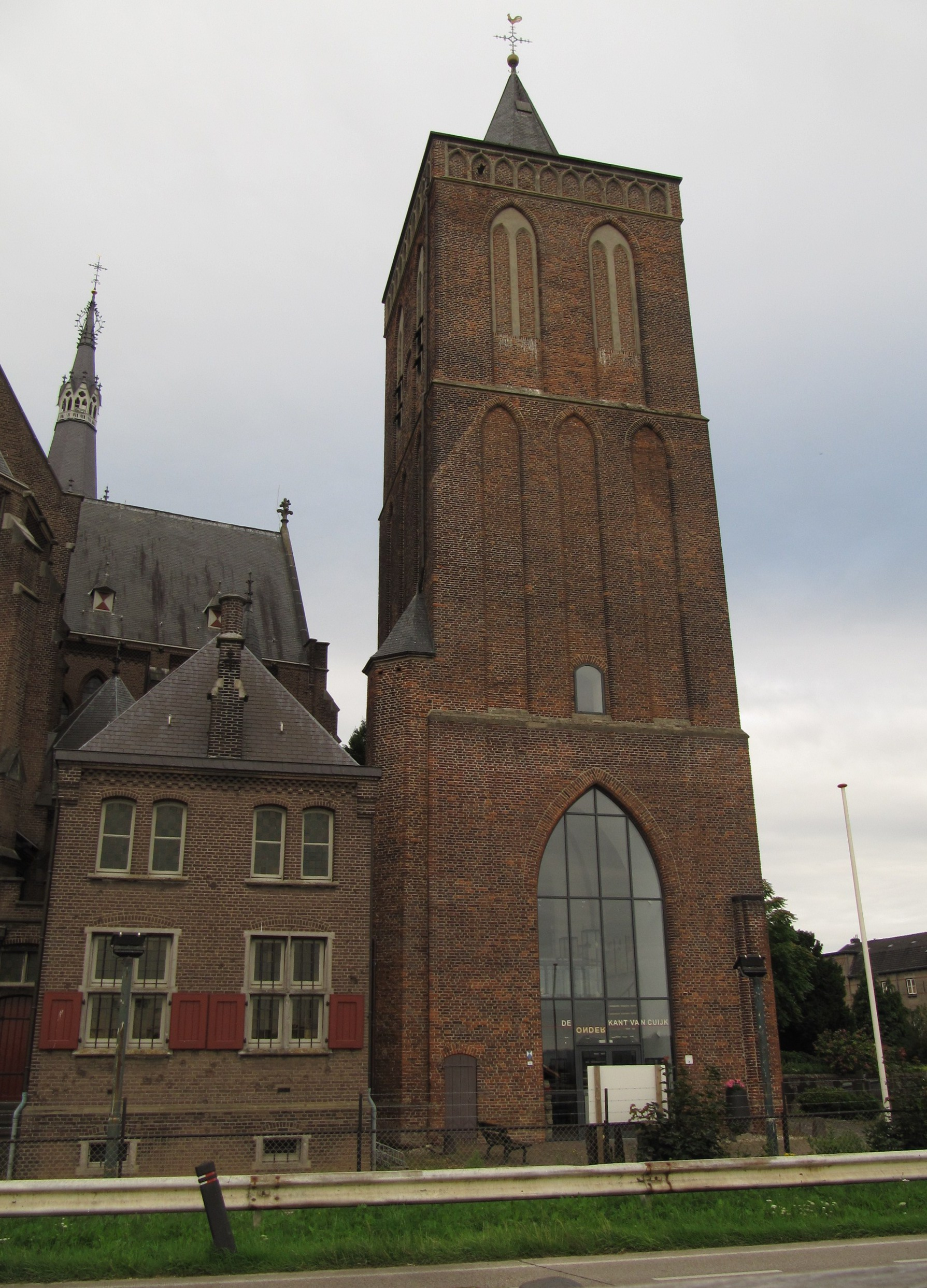 Cuijk - Kerktoren bij Sint Martinuskerk.jpg